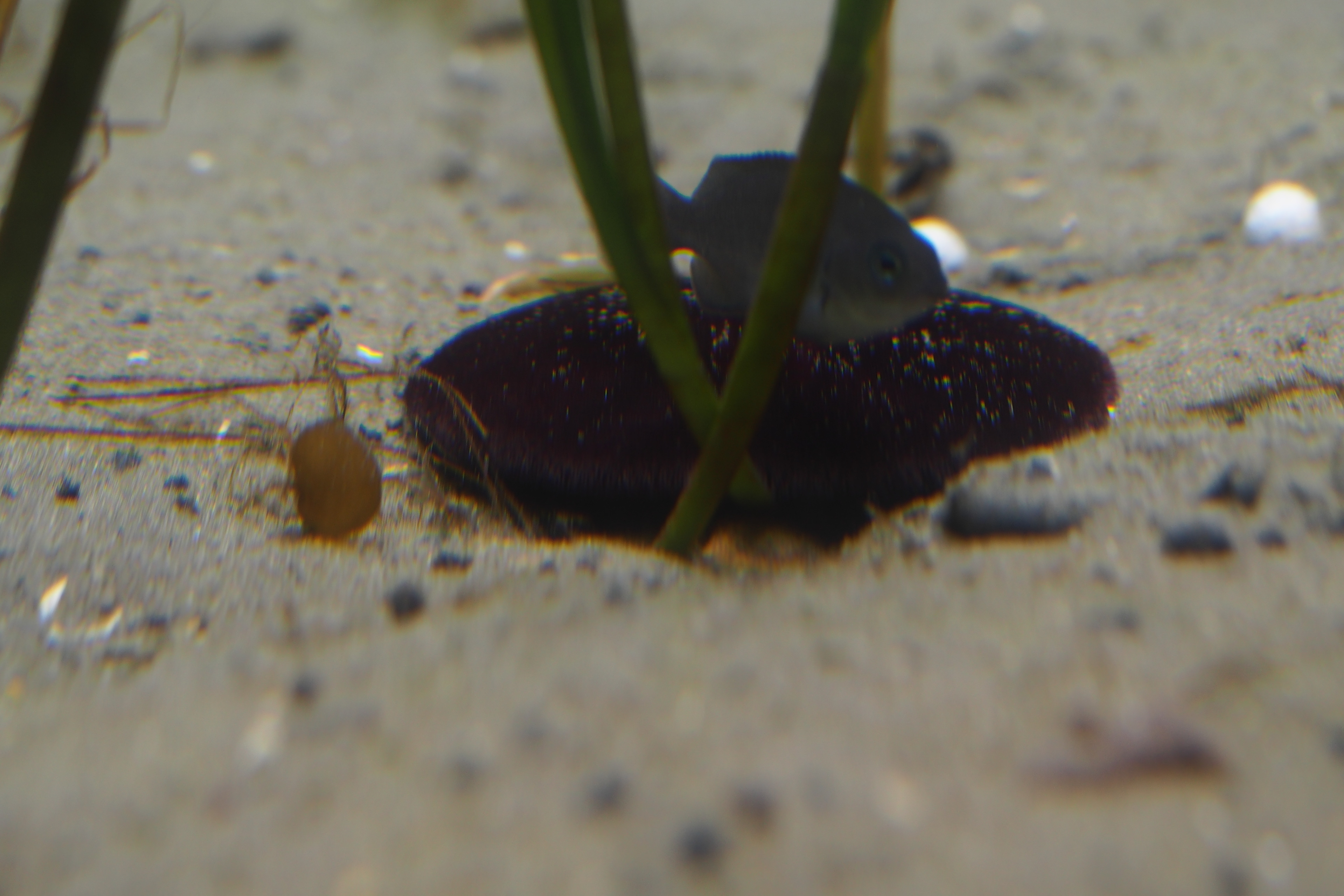 ハスノハカシパン. at Suma aquarium.